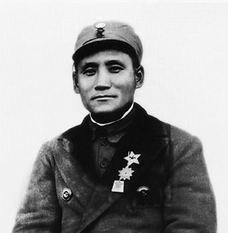 抗日战争时期的何长工